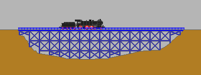 Gerüstbrücke